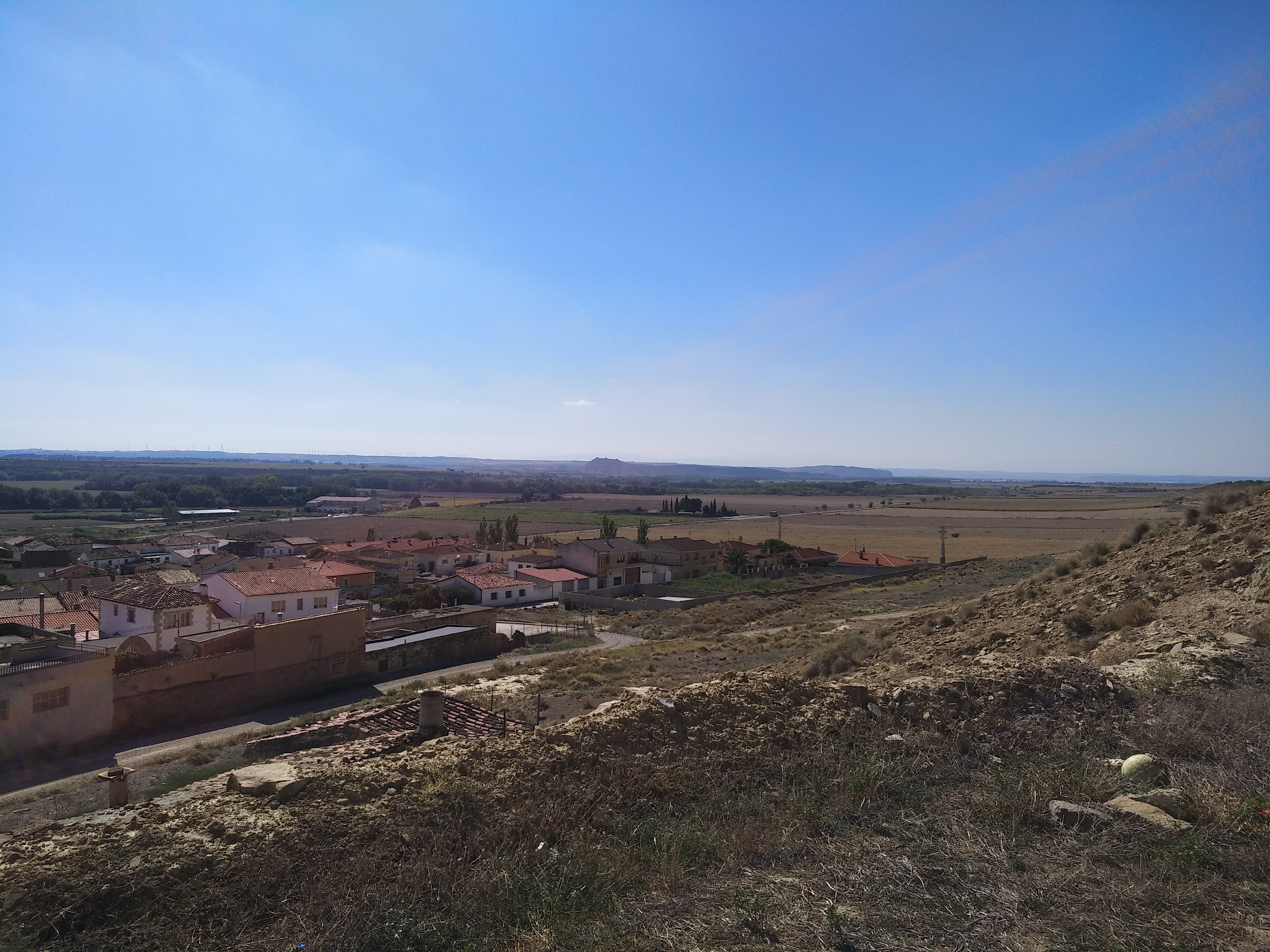 Santacara - Vista parcial con el despoblado de Rada al fondo